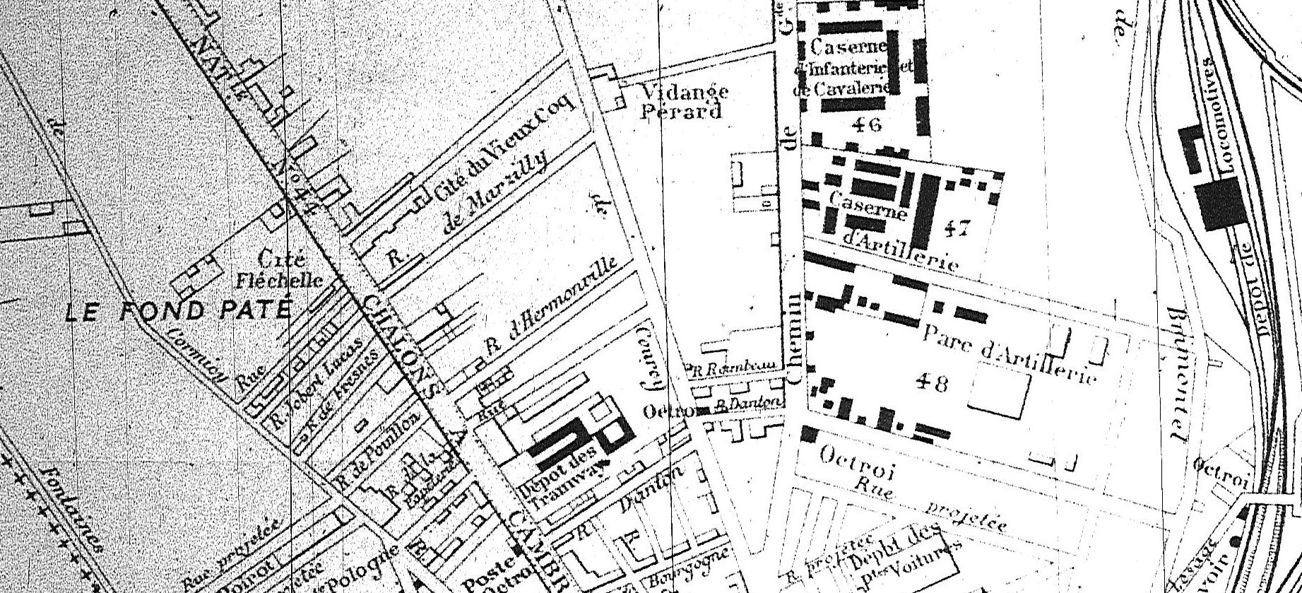 carte ancienne de Reims. côte BM Reims xxxii iii u.